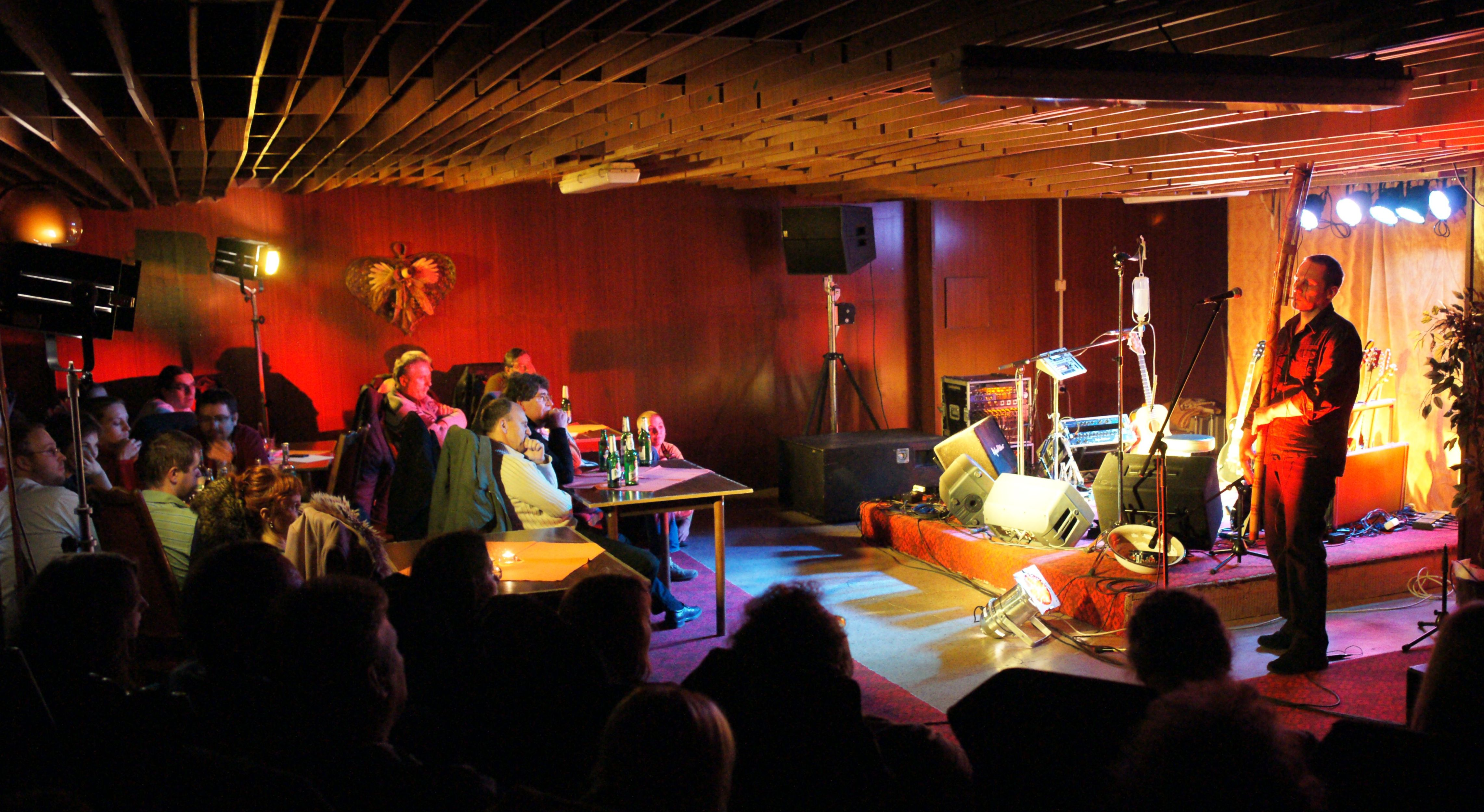 Andrej Šeban, Dom kulúry Lučenec